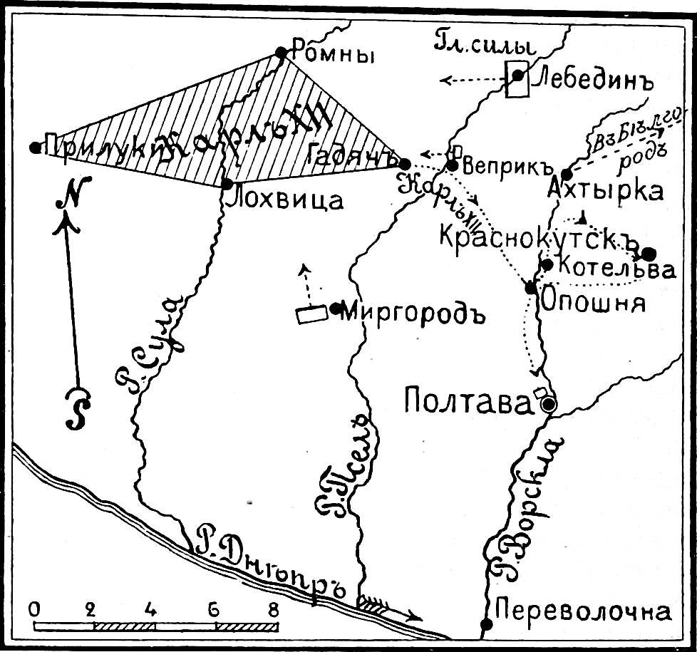 Эта фотография была использована для иллюстрирования статьи «Краснокутск» опубликованной в тринадцатом томе «Военной энциклопедии», который был издан книгоиздательским товариществом И. Д. Сытина в 1913 году в столице Российской империи городе Санкт-Петербурге. Более подробное описание к этой картинке можно прочесть в указанной выше статье.